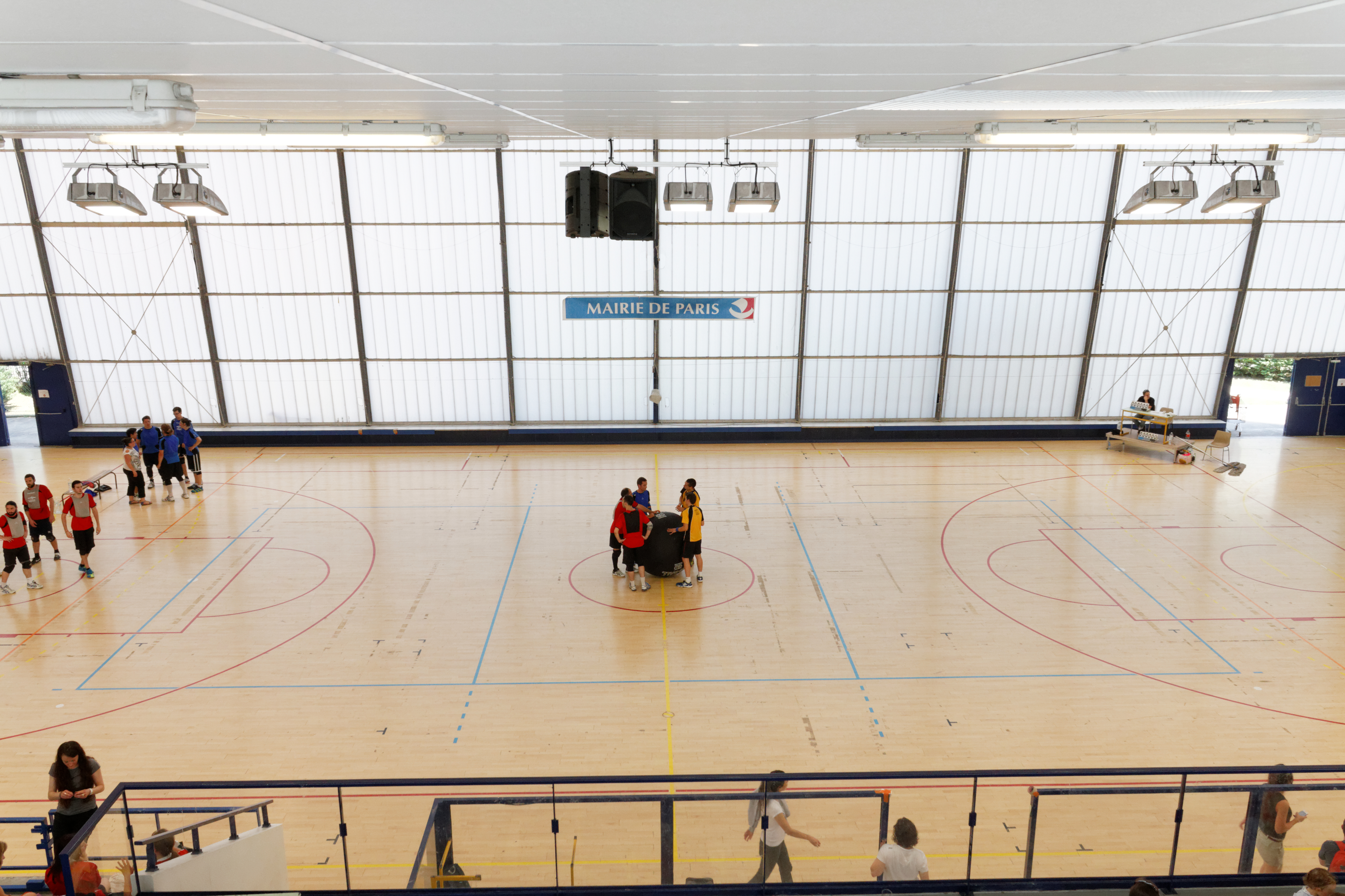 20e journée du championnat de France 2013-2014 de Kin-Ball, 8 juin 2014, Gymnase George Carpentier, Paris.